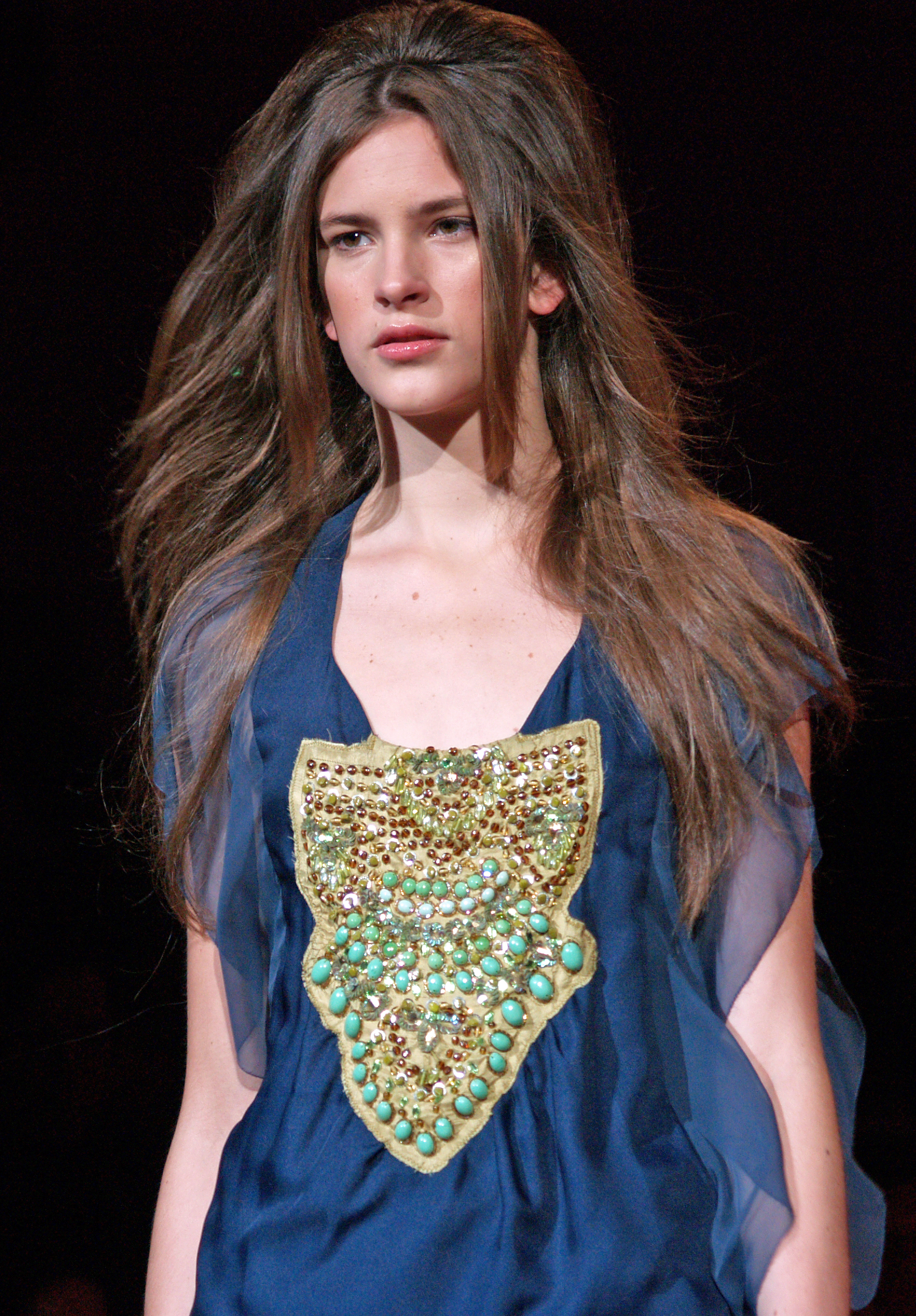 Flo Gennaro